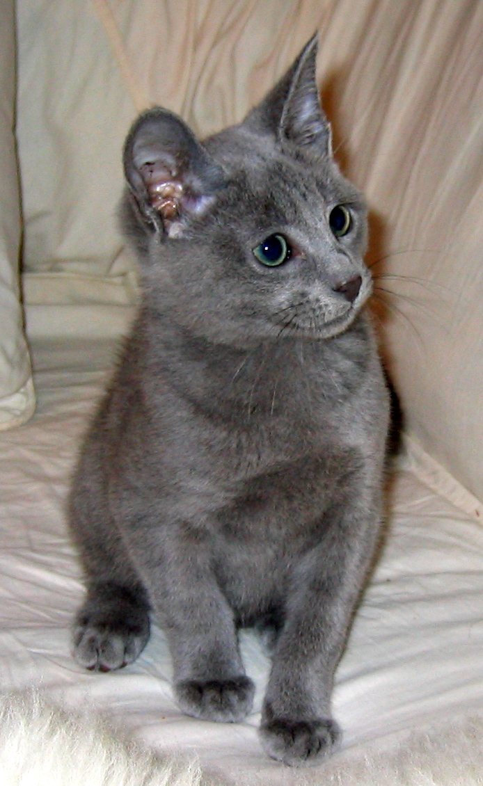 Gatito ruso azul de cuatro meses de edad. RUSIan BLUE ROCKS!